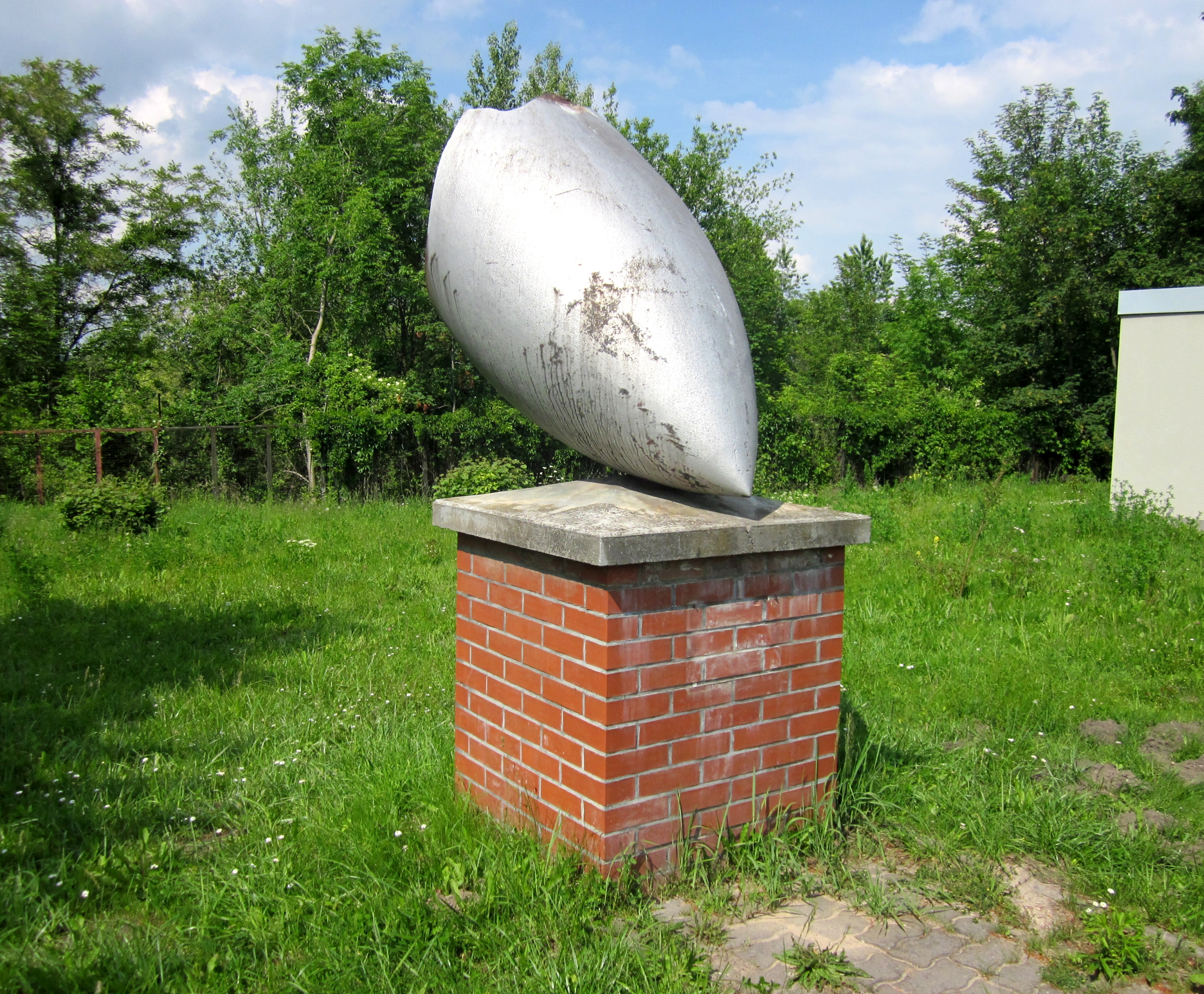 Die Spitze einer Tallboy-Bombe, die auf das Mineralölwerk Lützkendorf abgeworfen wurde, wurde in Krumpa als Mahnmal für die Bombardierungen im Zweiten Weltkrieg aufgestellt.